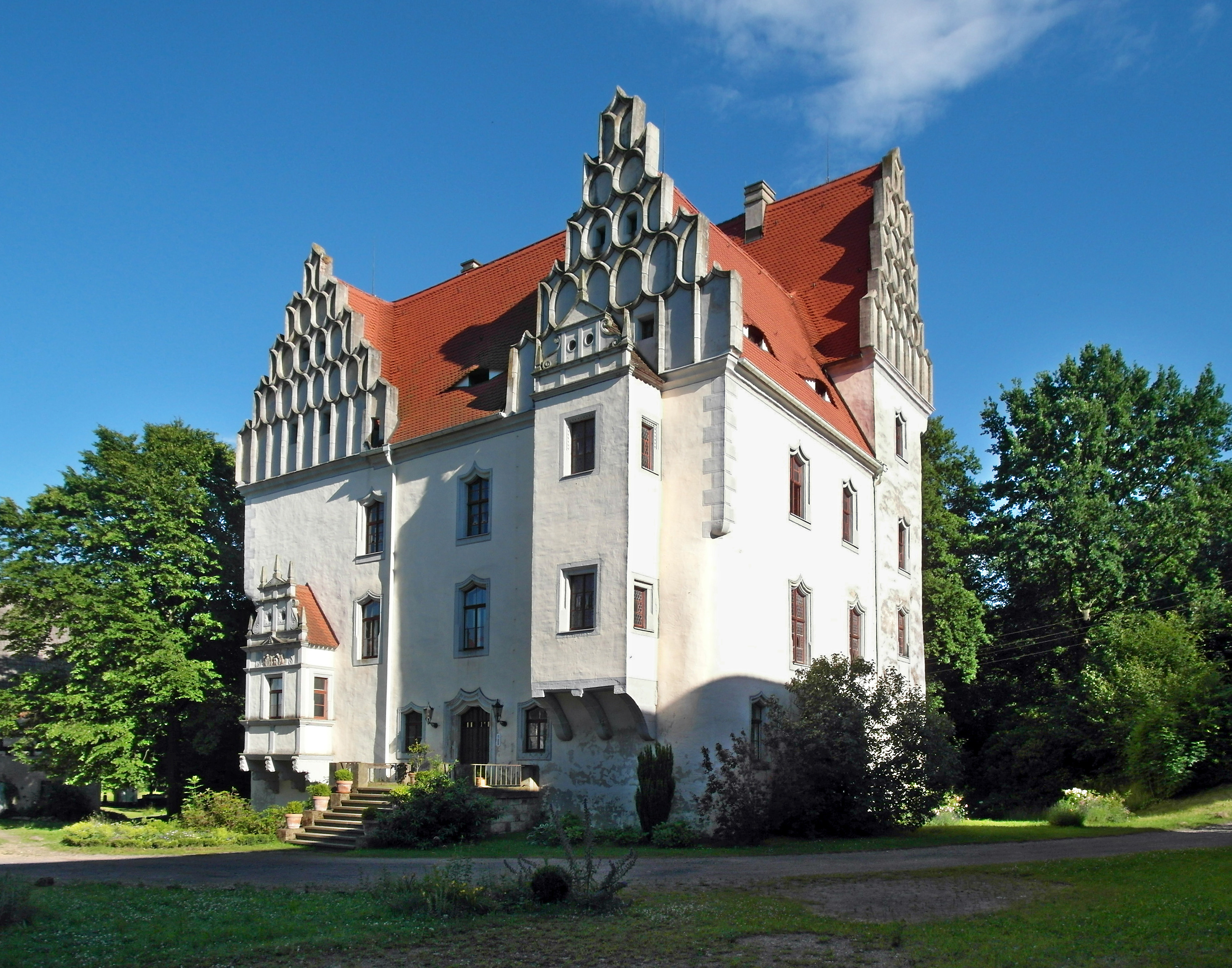 22.06.2016 01683 Heynitz (zur Stadt Nossen): Schloß von Nordwesten, Hofseite. Das Renaissanceschloß (16. Jh.) Heynitz gehörte über acht Jahrhunderte der Adelsfamilie von Heynitz. Hervorge- gangen ist es aus einer Wasserburg des 12./13. Jh. In dem kleinen Erker auf der Parkseite im 2. OG befindet sich der Chor einer Hauskapelle. Nach 1945 wurde der Besitz enteignet und an Neu- bauern aufgeteilt. Im Schloß waren Wohnungen u. Schulräume. Außerdem befand sich hier die Gemeindeverwaltung. Seit 2004 gehört das Schloß der Eigentümergemeinschaft Familie v. Watzdorf und dem Förderverein Schloß Heynitz. [SAM6669.JPG]20160622110DR.JPG(c)Blobelt